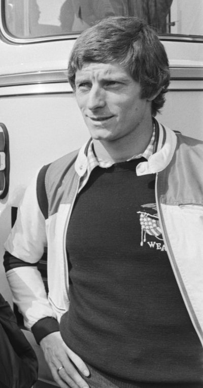 Jean-Michel Larqué de l'AS Saint-Etienne.